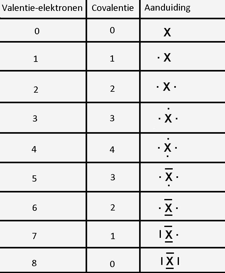 Een tabel met de covalenties bij verschillende hoeveelheden valentie-elektronen en hoe je dat tekent